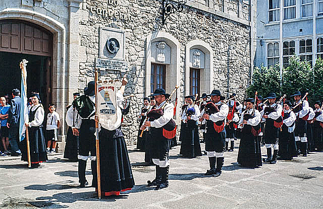 escola de gaitas a finales de la decada de 1990